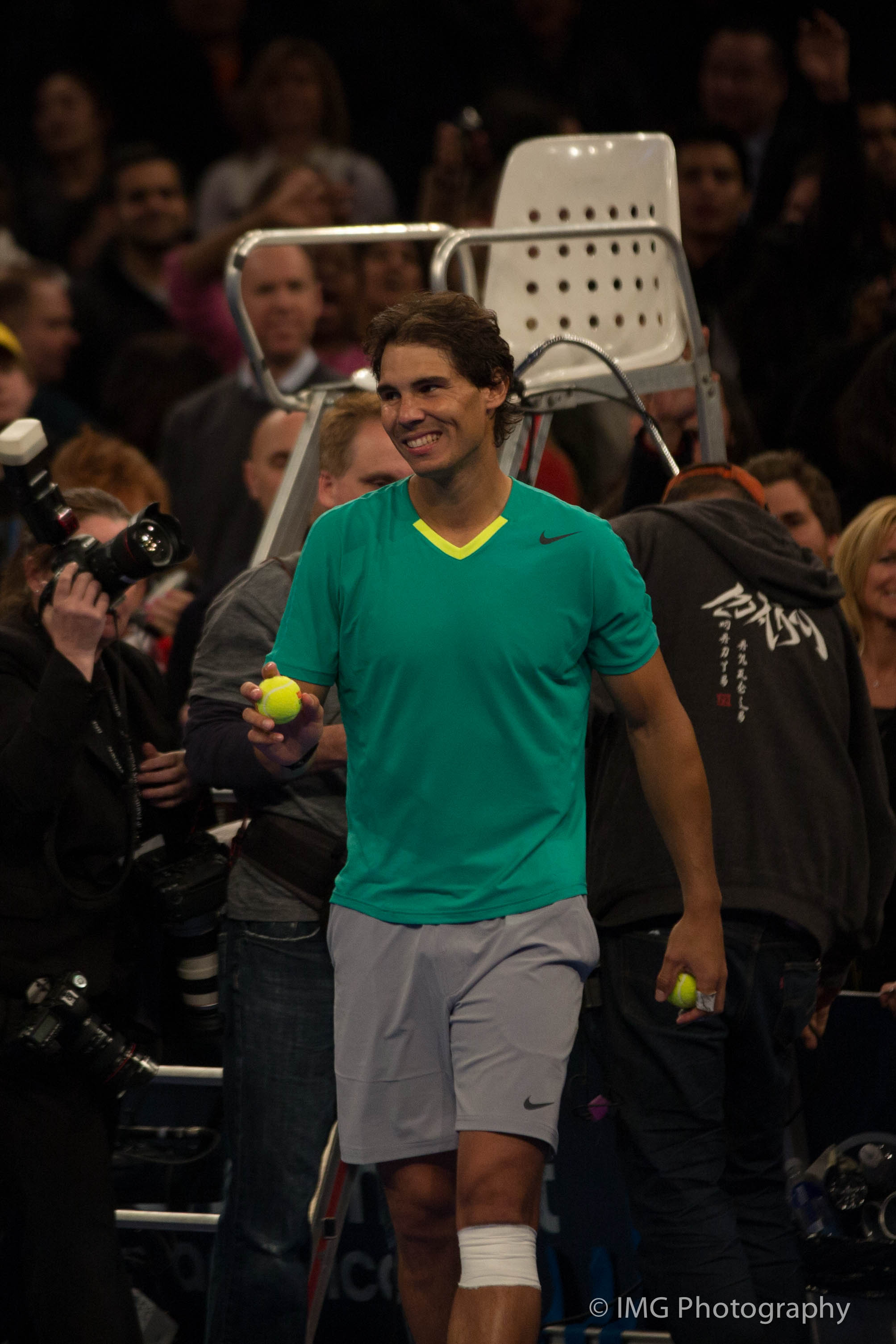 2013 BNP Paribas Showdown - Rafael Nadal vs Juan Martín del Potro